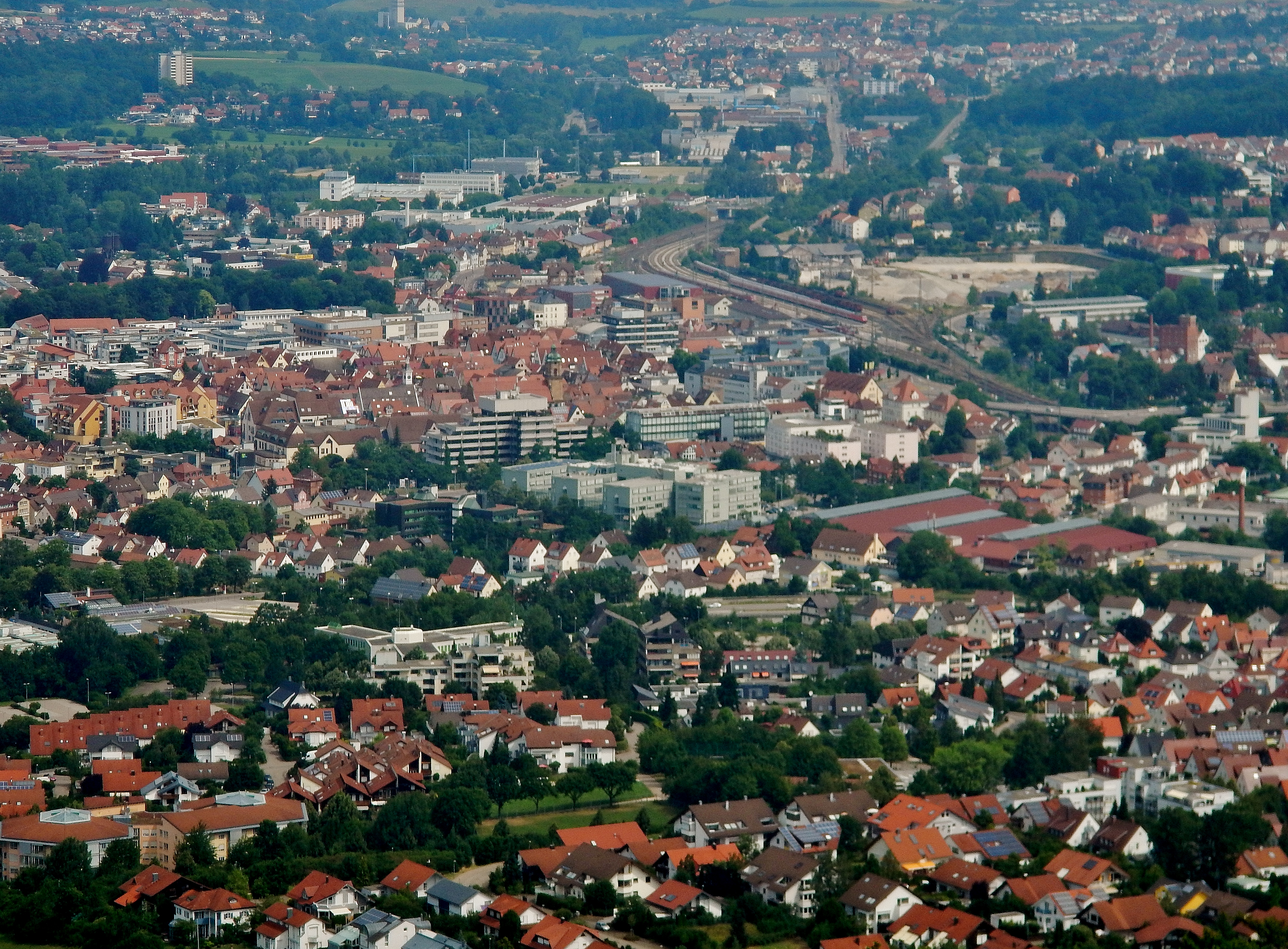 Aalen